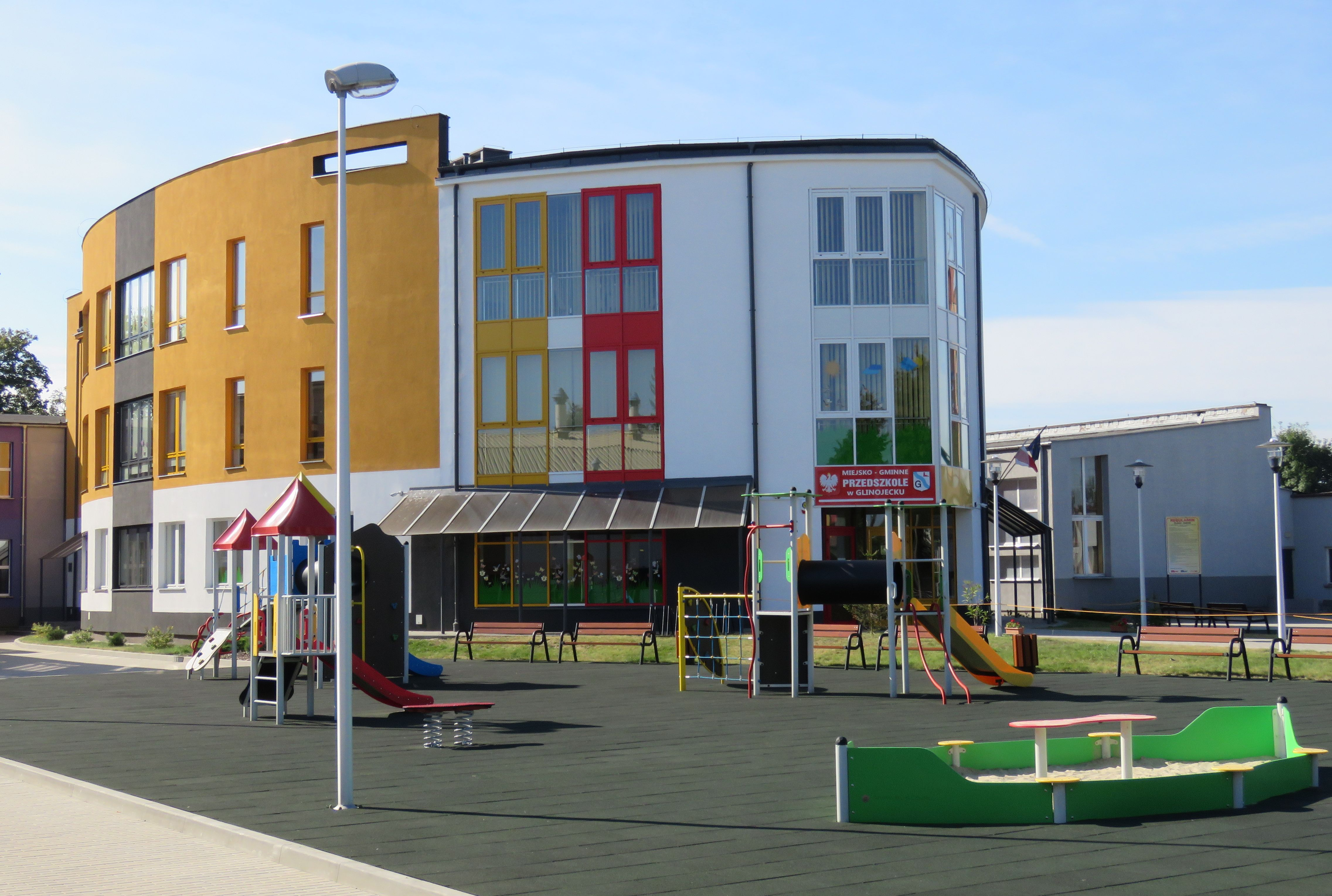 Glinojeck